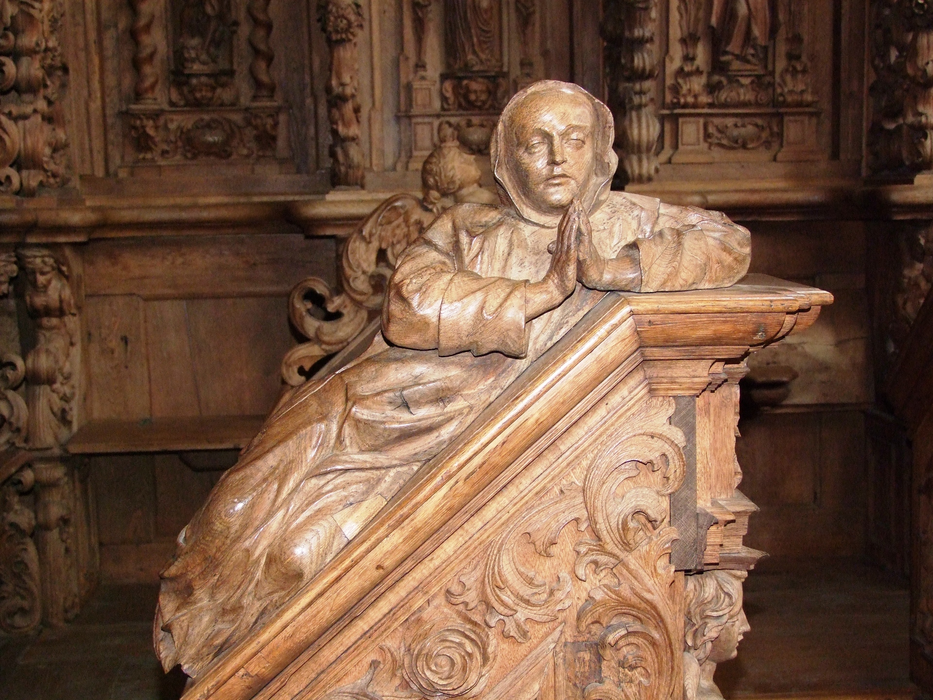 Das Chorgestühl in der Klosterkirche des ehemaligen Kartäuserklosters Buxheim Ein betender Kartäusermönch im Chorgestühl Buxheim.